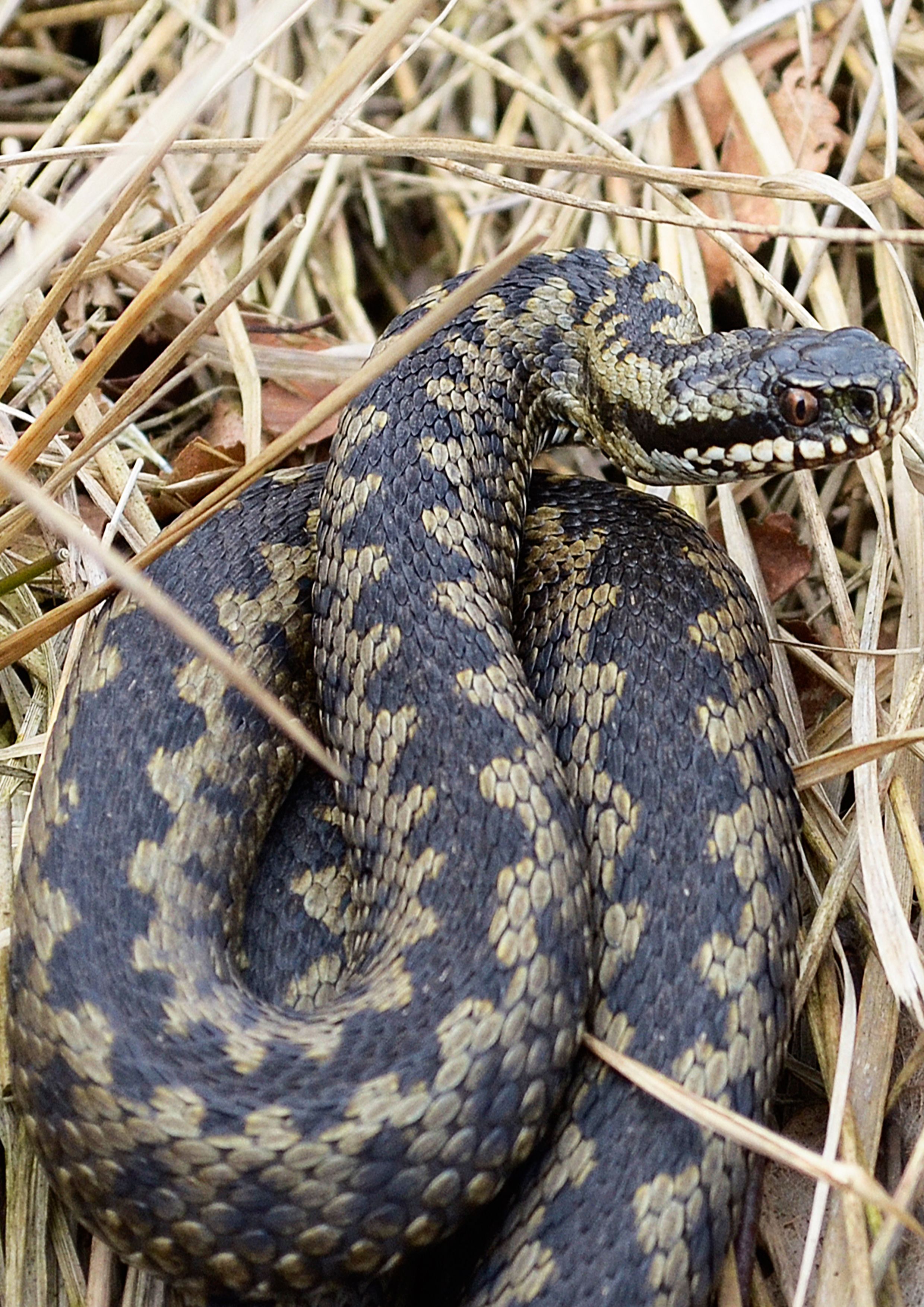 Adder ligt in de zon zich op te warmen